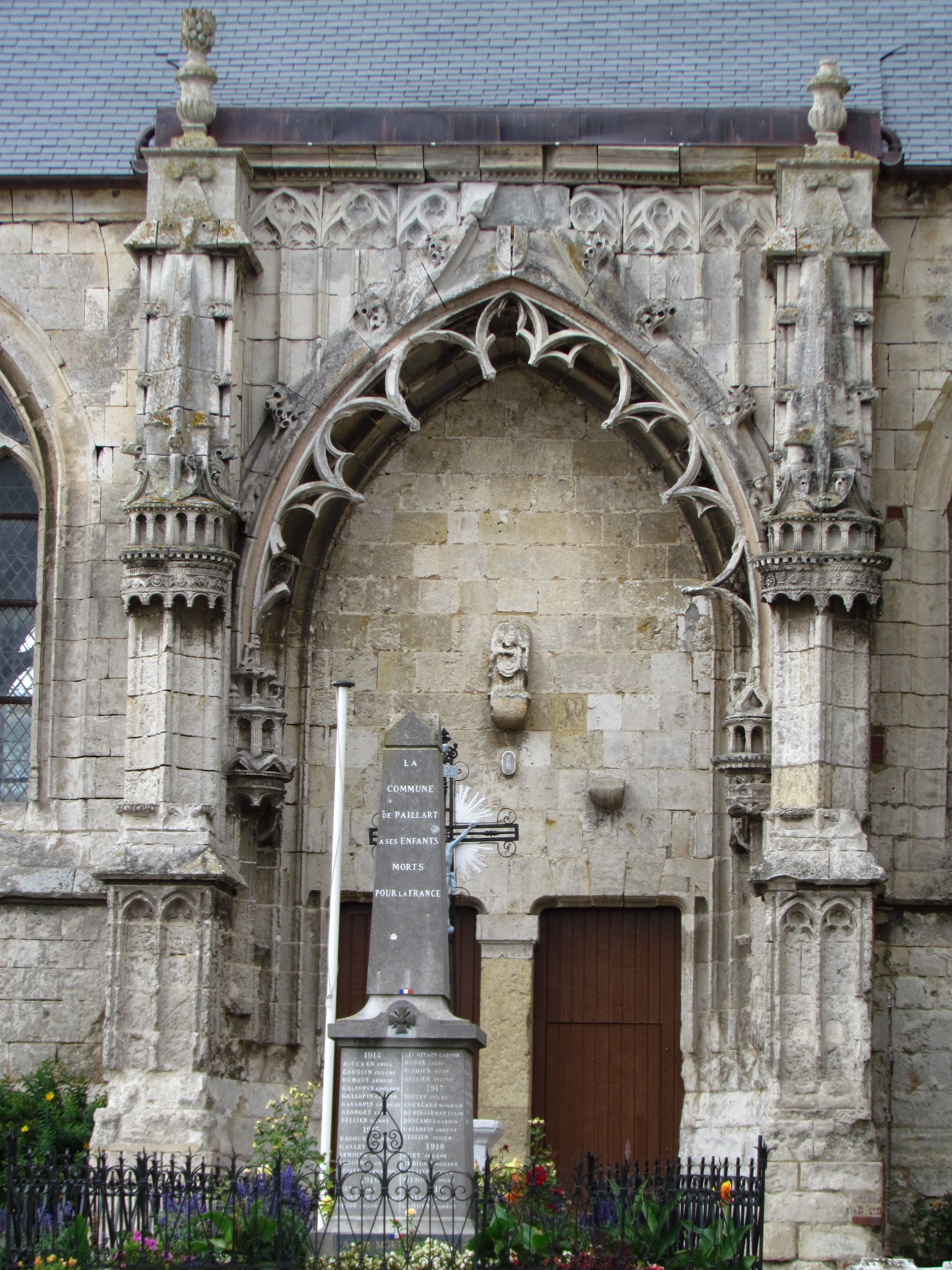 Église Saint-Denis de Paillart, (Classé, 1992) .